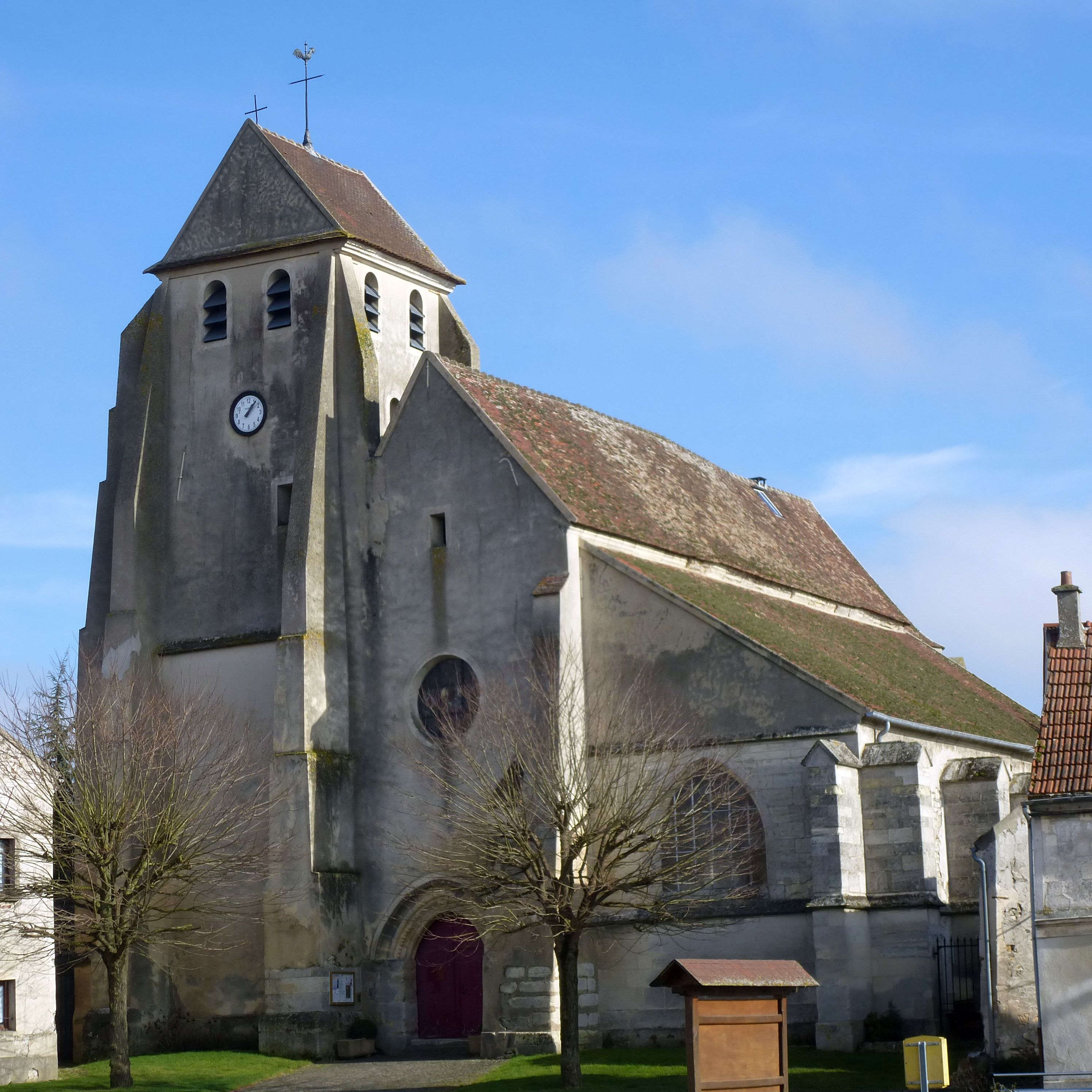 Église Saint-Pierre et Saint-Paul de Chambry. (département de la Seine-et-Marne, région Île-de-France).